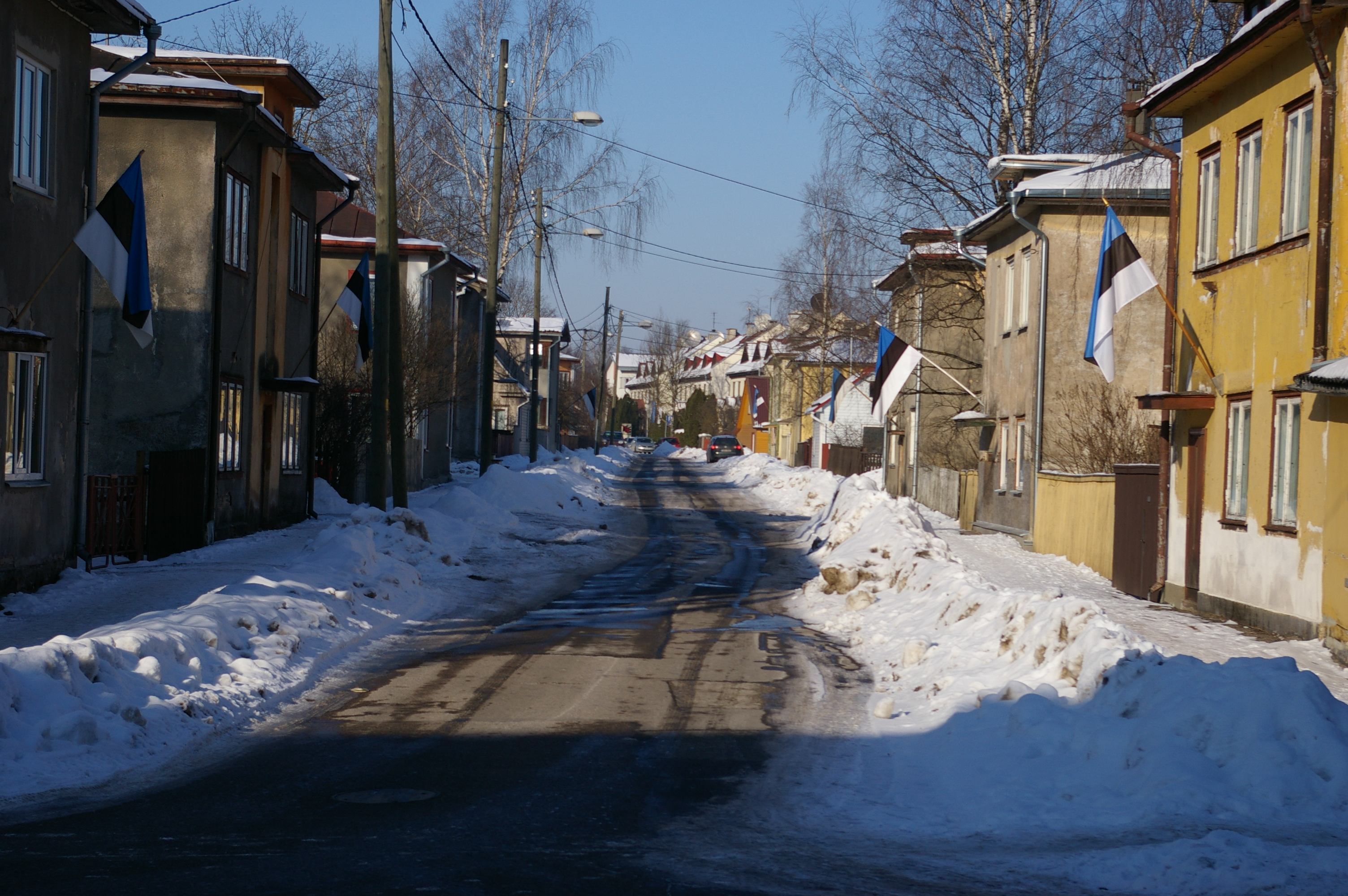 Tehase tänavast vaade Kalevi tänavale